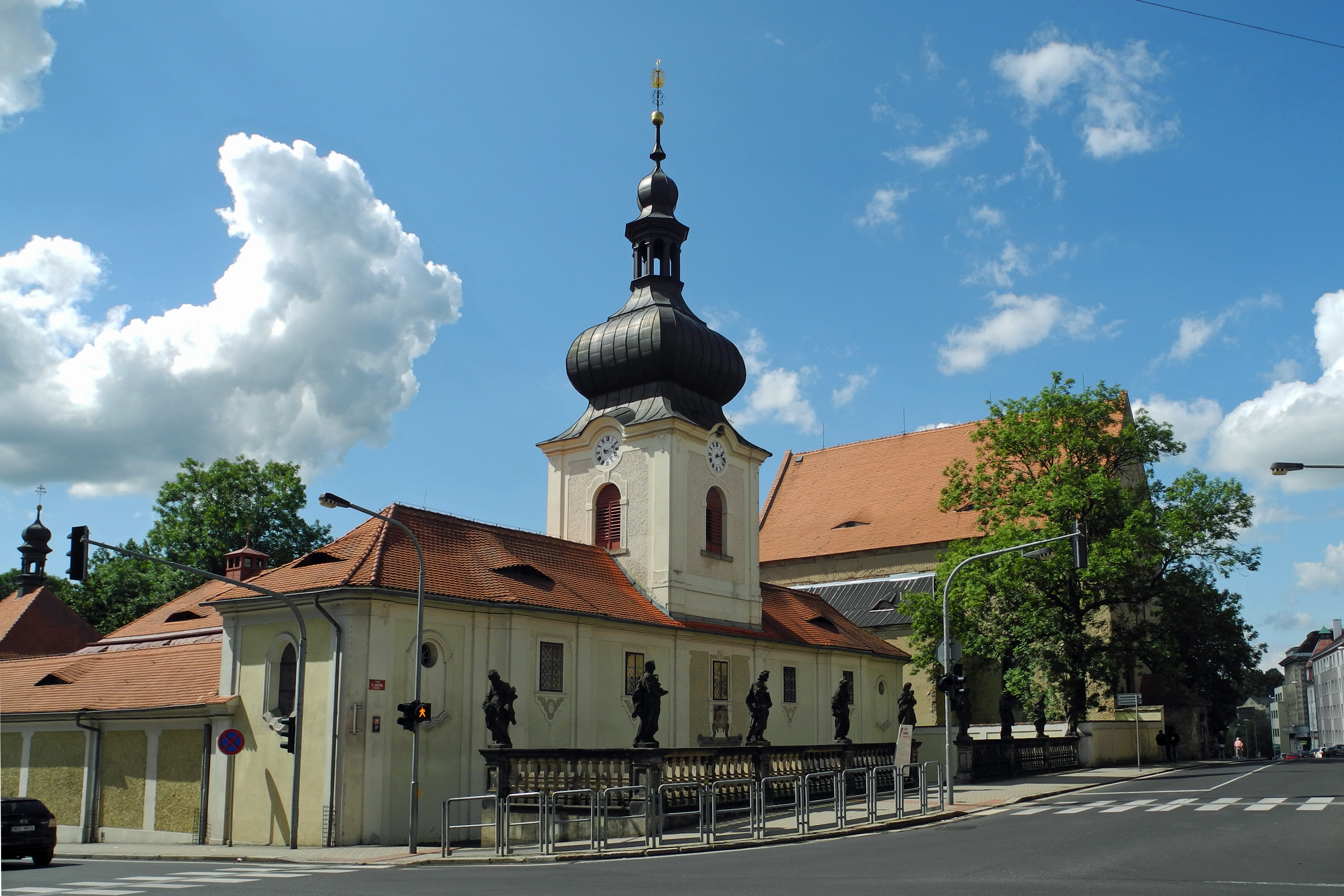 Loreto-Kapelle im ehem. Kapuziner-Kloster in Rumburk (Rumburg), tř. 9. května